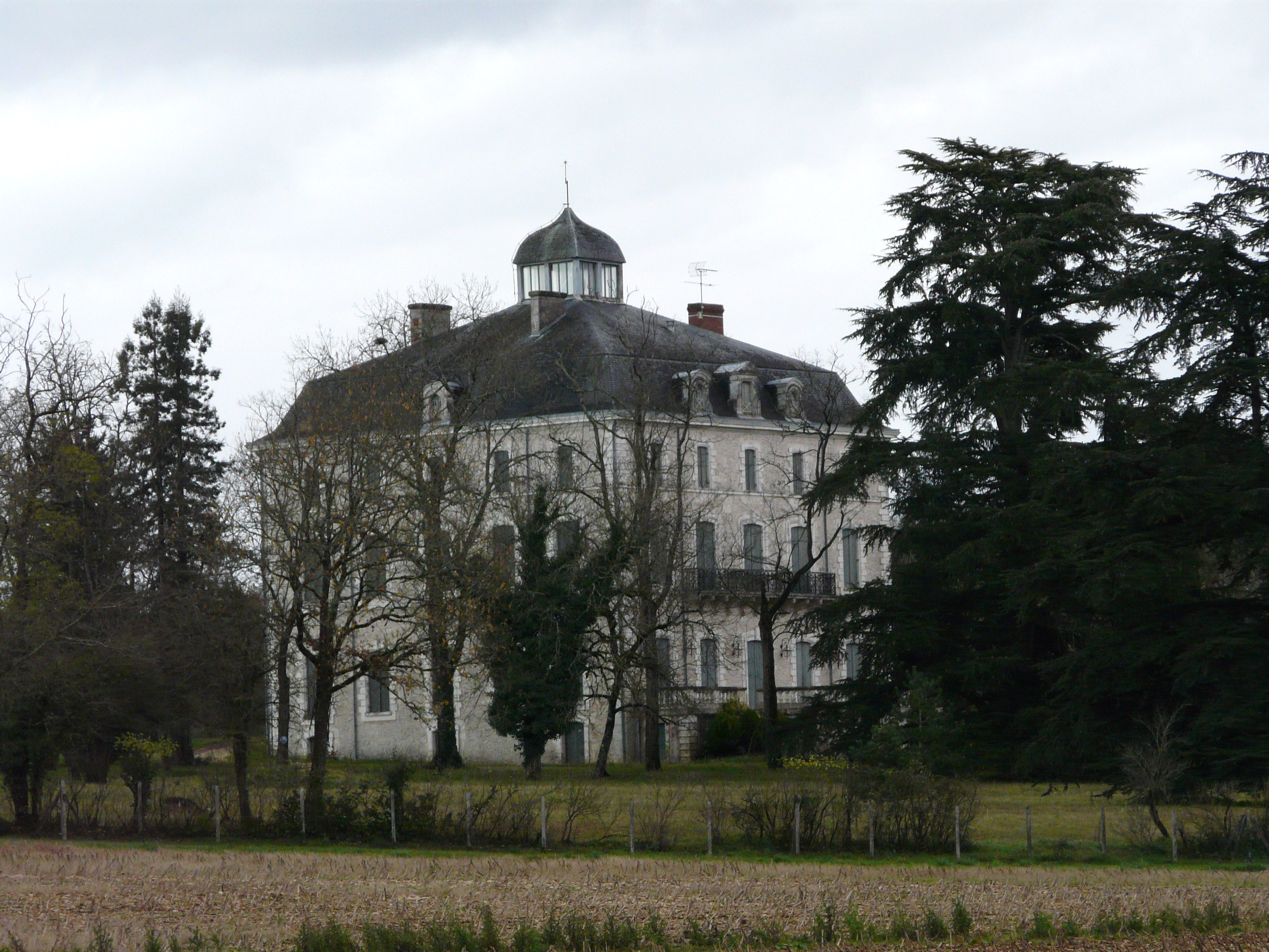 Château du Roc Chautru, Le Change, Dordogne, France